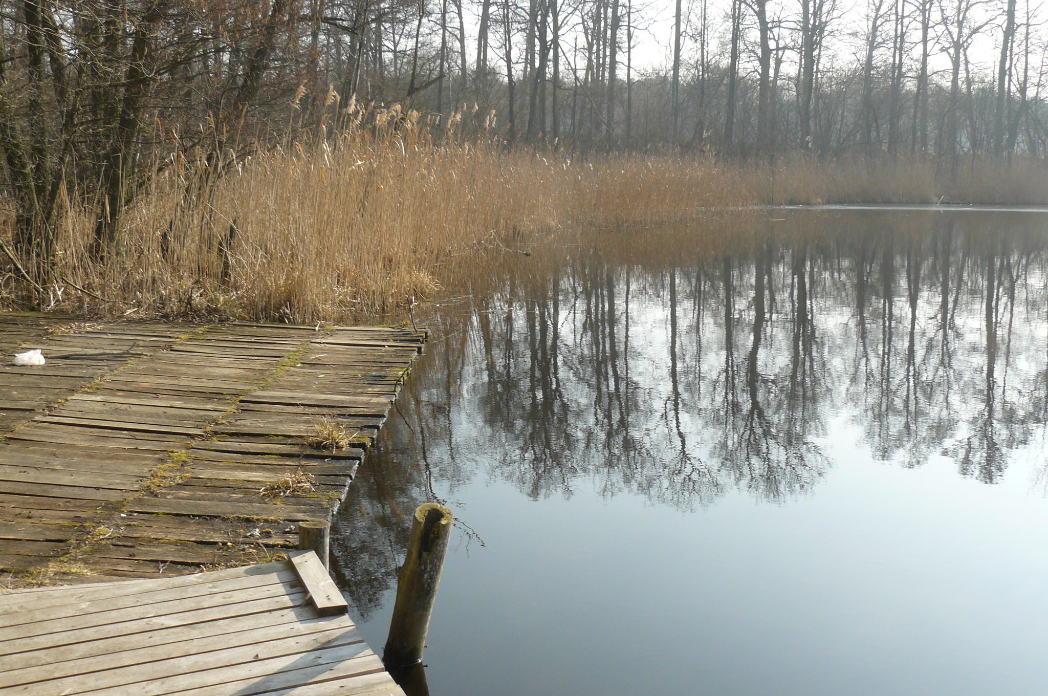 Jez. Ósemka - jeziora Babskie.